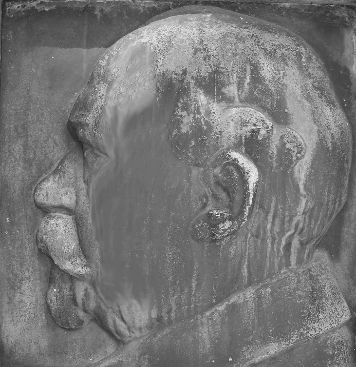 Wilhelm Blos, Portraitrelief auf seinem Grabstein, Pragfriedhof, Stuttgart